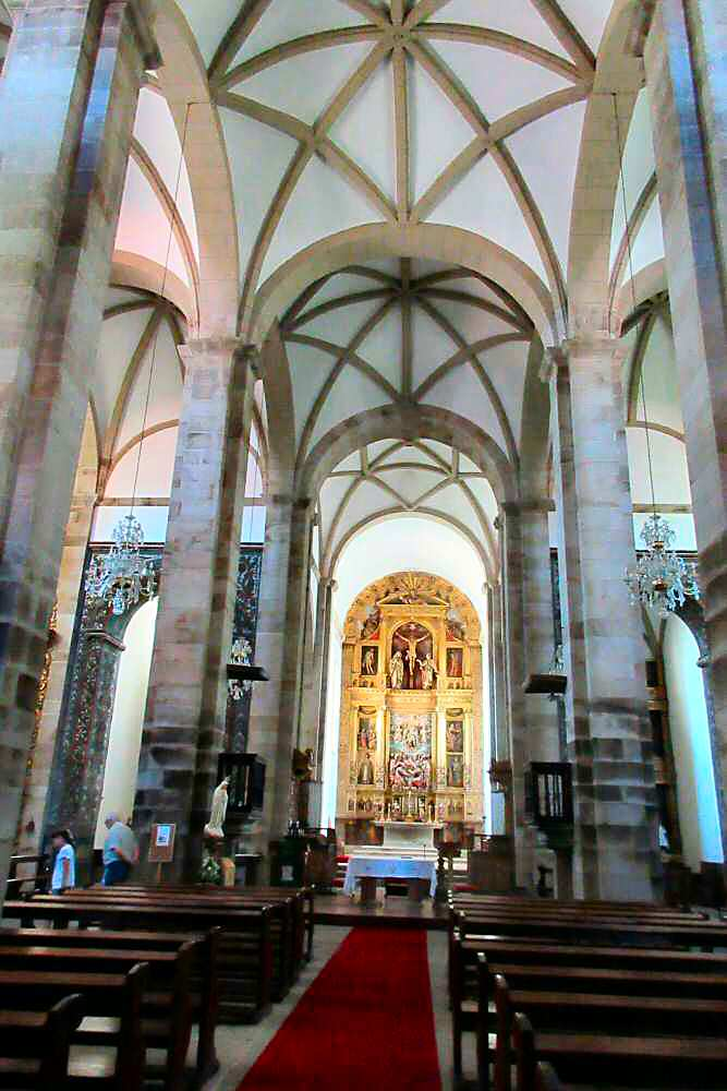 Interior de la nave central y del retablo del altar mayor de la Catedral de Miranda do Douro.